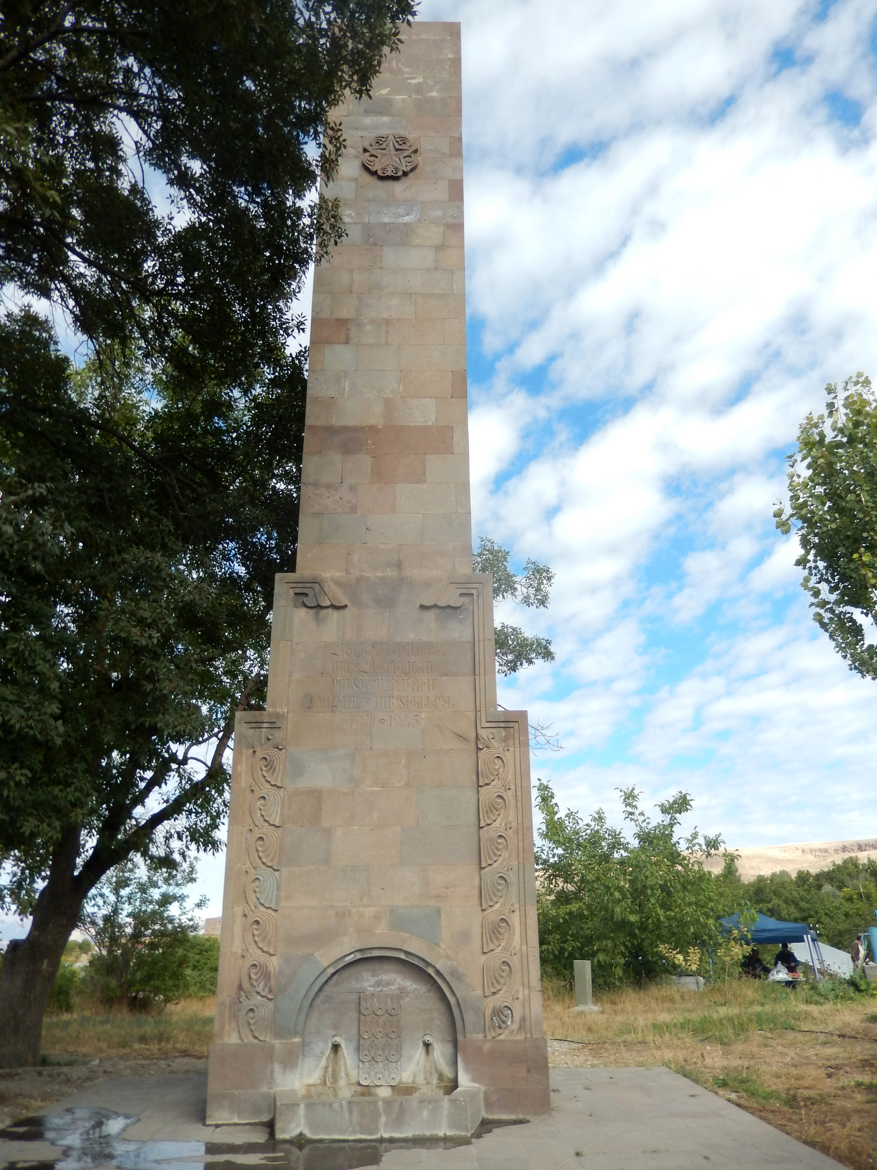 Հուշարձան Երկրորդ աշխարհամարտում զոհվածներին, Խաչիկ 25/6